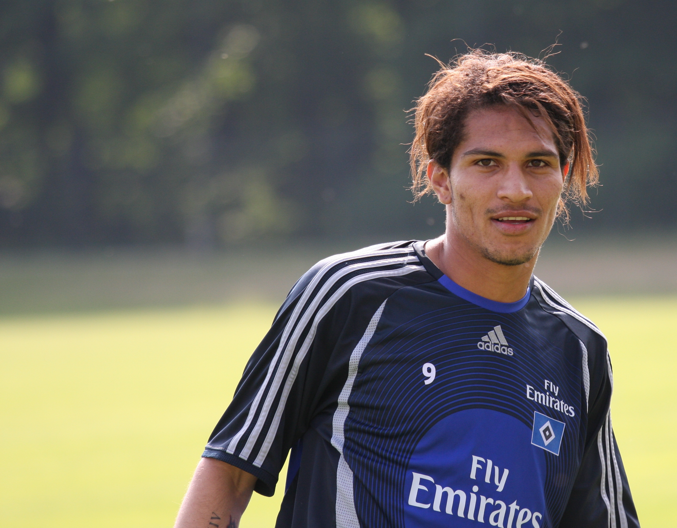 Paolo Guerrero beim Training an der HSH Nordbank Arena 2008.